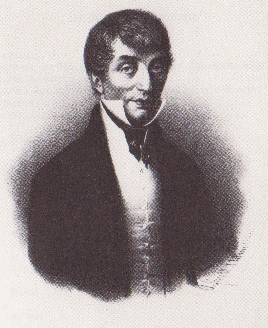 Provinzialkommissar von Rheinhessen Ludwig von Lichtenberg